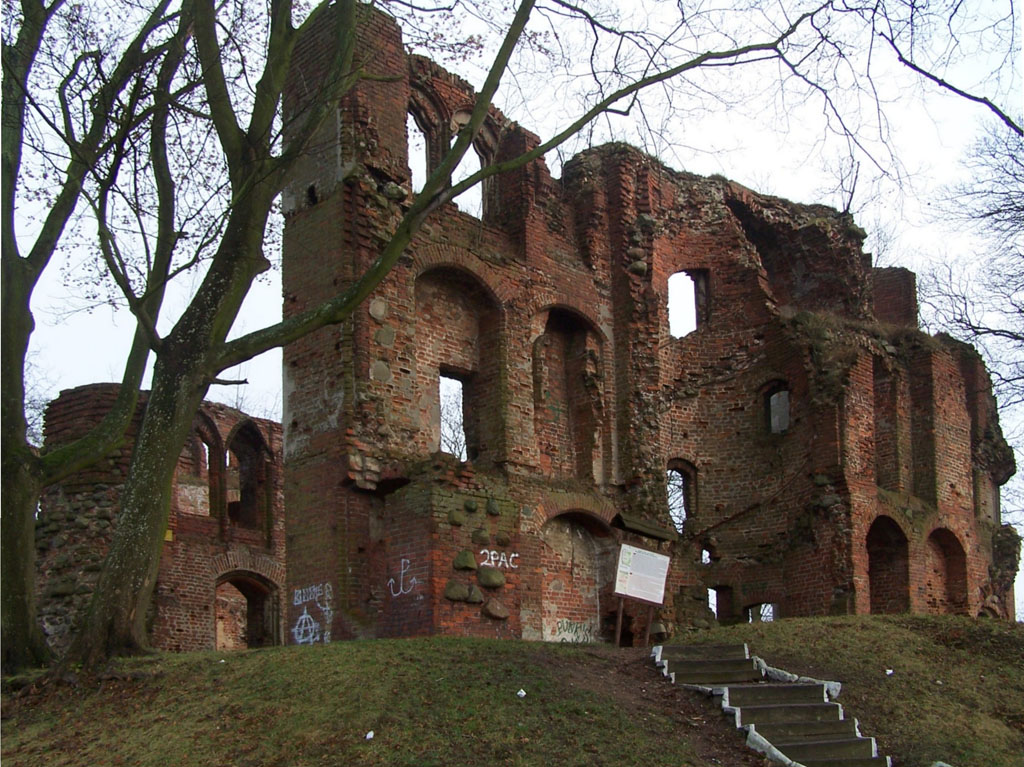 Zamek von Dewitz w Dobrej Nowogardzkiej